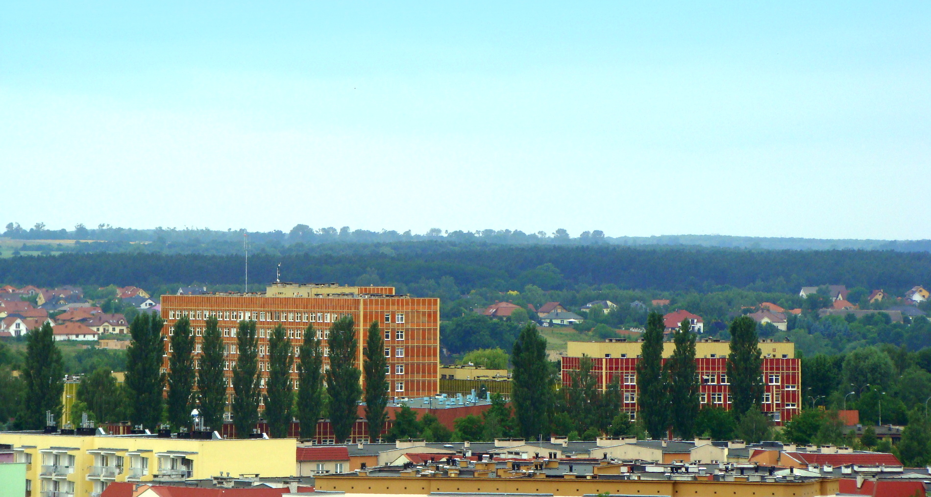 Samodzielny Publiczny Szpital Wojewódzki w Gorzowie Wlkp., Zespół Szpitalny przy ul. Dekerta